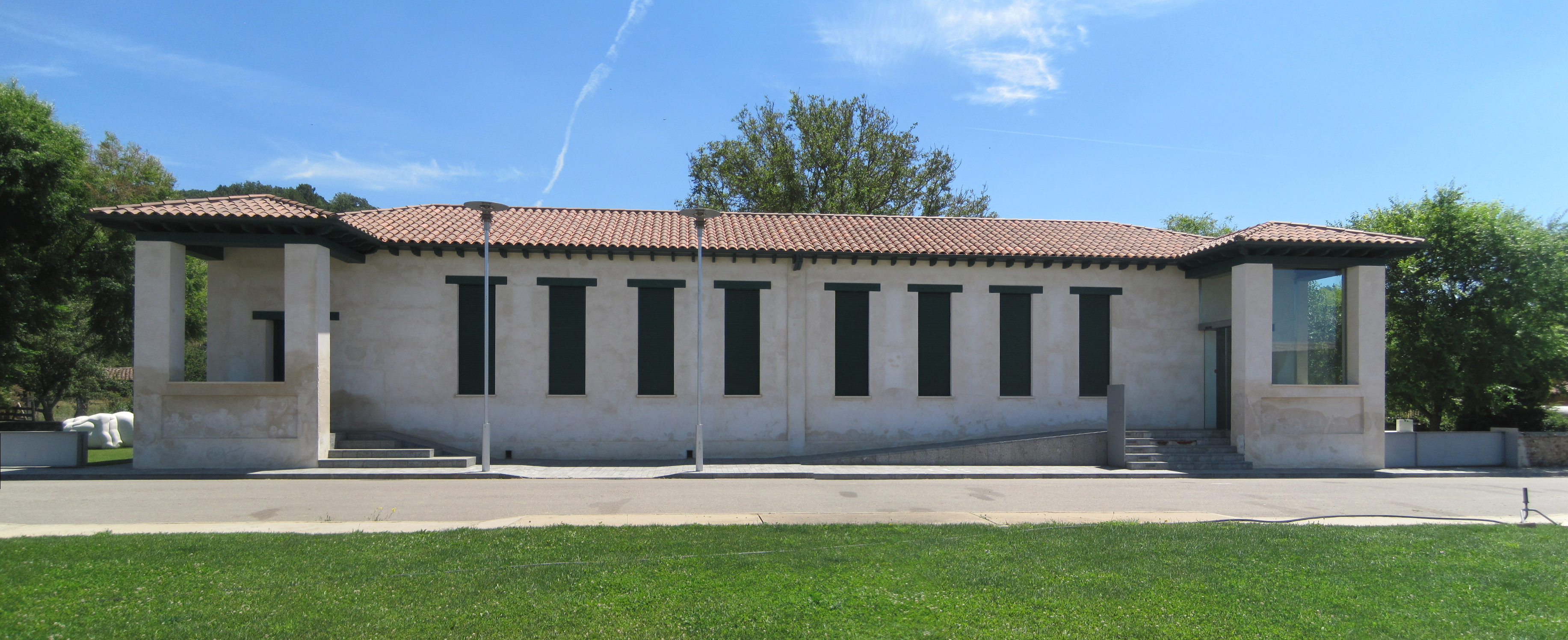 Sede de la Fundación Cerezales Antonino y Cinia, en Cerezales del Condado (León, España).